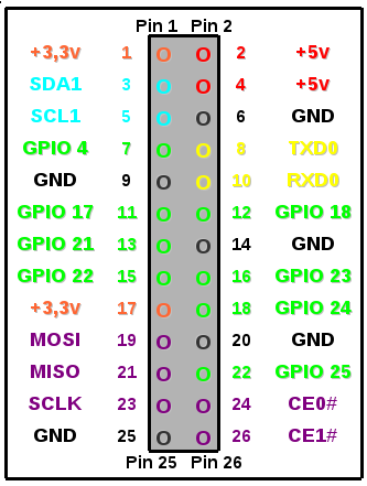 Raspberry Pi, Modèle B, 512 Mo, brochage du GPIO (26 pins).